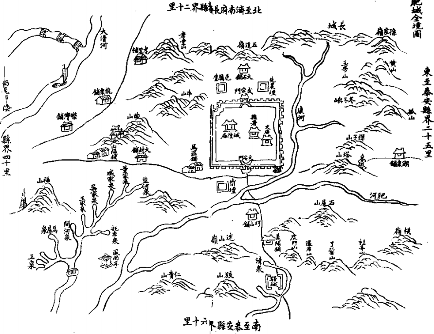 光绪版《肥城乡土志》肥城全境图